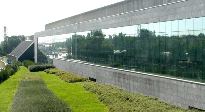 Porta Innovazione VEGA